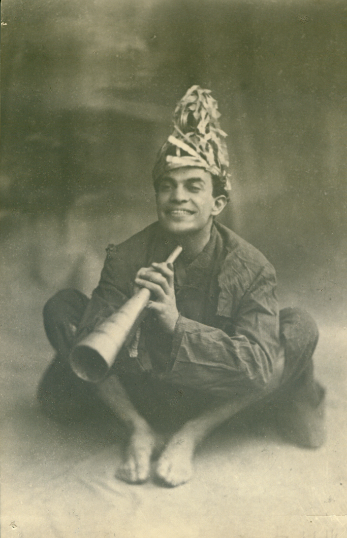 Viviani come scugnizzo nella Festa di Piedigrotta del 1919